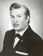 Víctor Cordero Aurrecoechea — a Mexican composer.